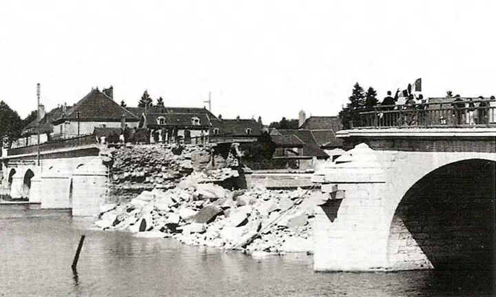 Photo retrouvée dans les archives familiales et scannée.